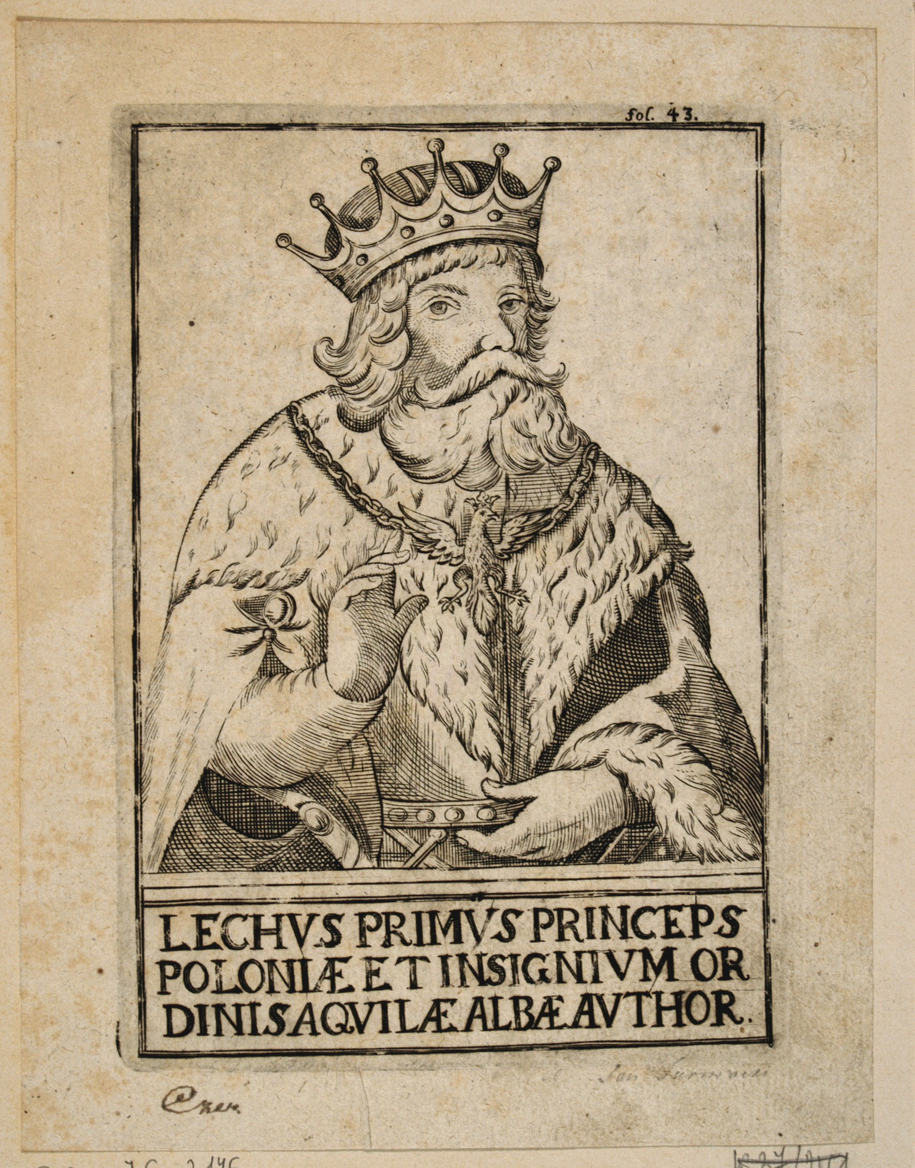 Lech I "Lech pierwszy książę Polan sygnowany w rodzimej Nysie, naznaczony symbolem orła białego". - "Lechvs Primvs Princeps Poloniae et Insignium Ordi Nisa Qvilae Albae Avthor" [Dokument ikonograficzny]